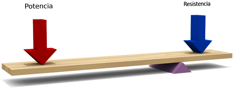 Ilustración que muestra a una palanca de tipo 1. Copyright © 2004 César Rincón. Imagen creada para la Wikipedia en Español.